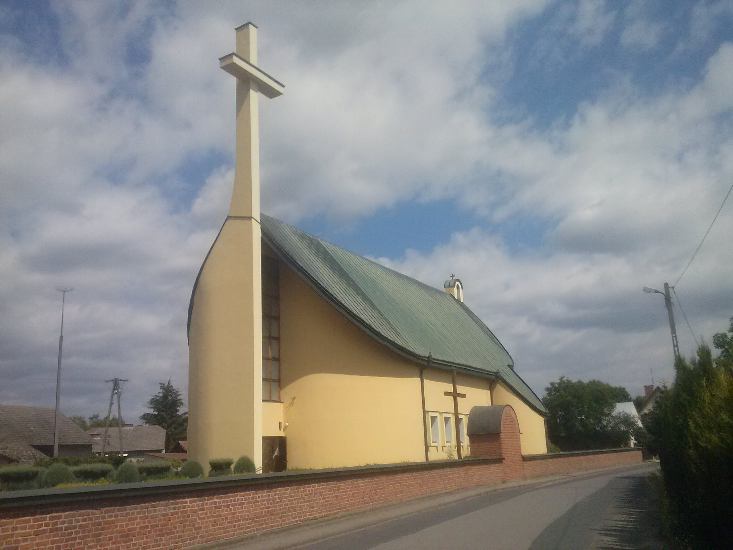 Kościół parafialny w Wierzawicach